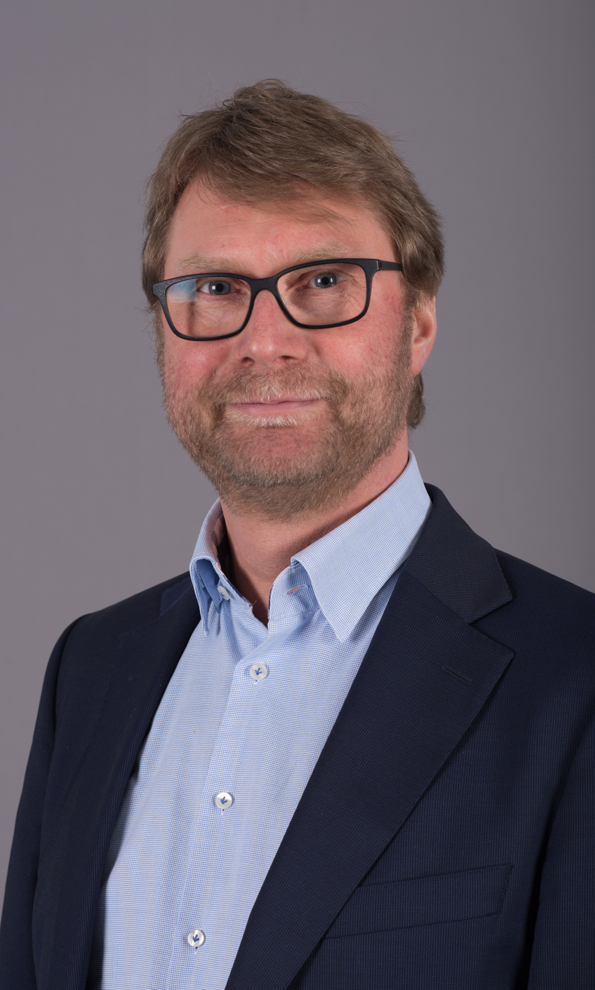 Landtagsprojekt im Thüringer Landtag: Dirk Adams, MdL Thüringen